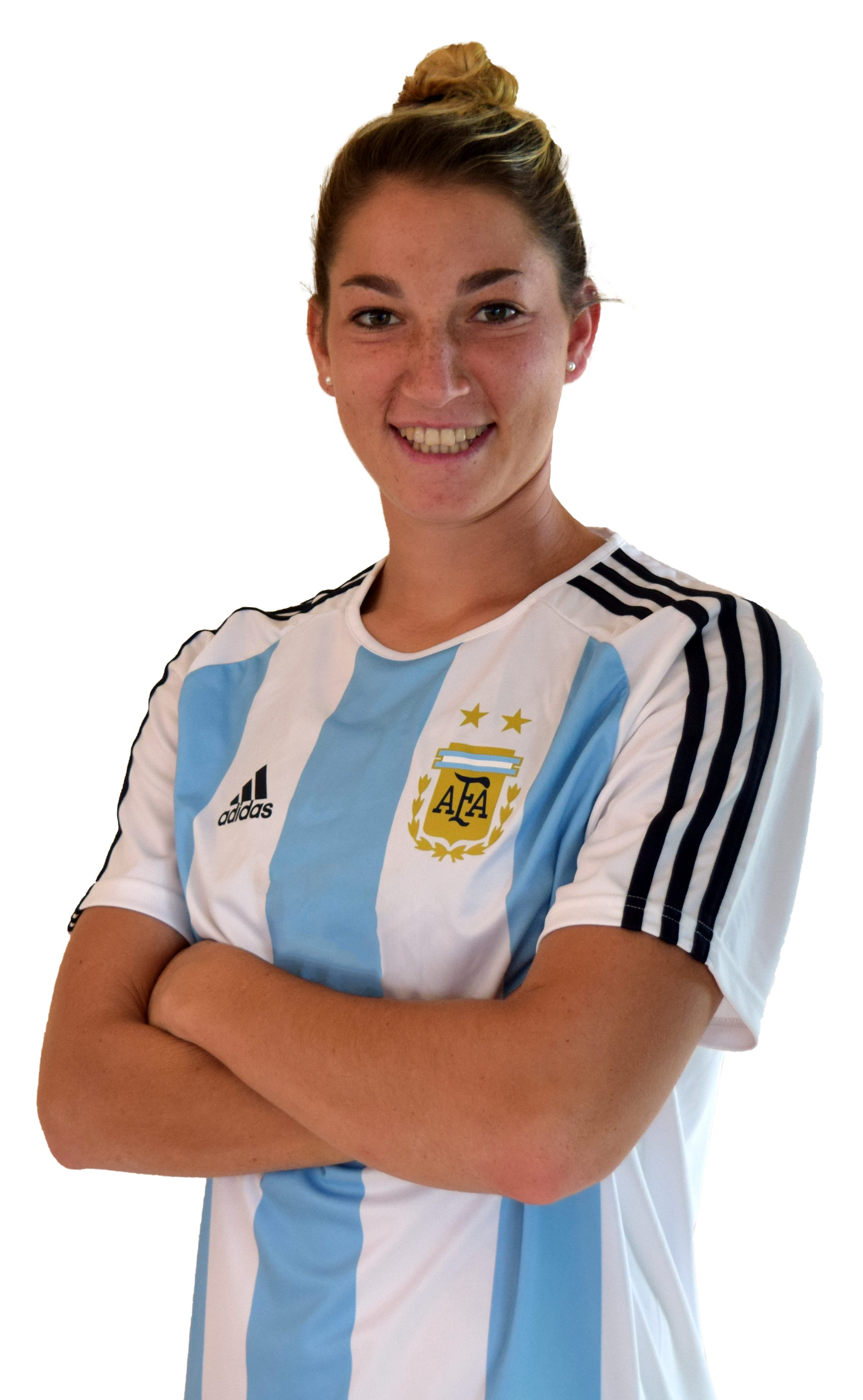 Aldana Cometti, jugadora de la selección mayor femenina de fútbol de Argentina.Foto sacada previo al primer partido del repechaje por un lugar para el mundial de futbol femenino de Francia 2019.